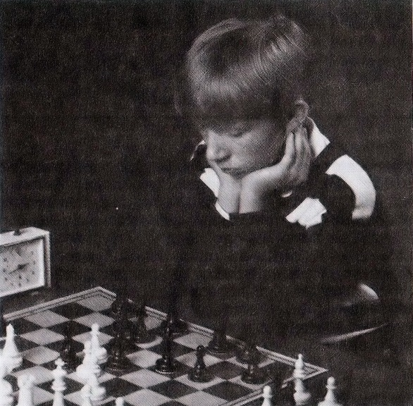 Krzysztof Gratka (ur. 15 lipca 1982) – polski szachista.